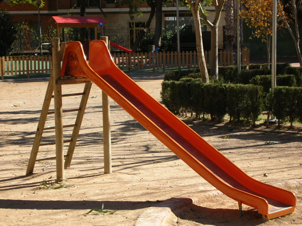 Slide in the Parque de Alcacer in Valencia, Spain.